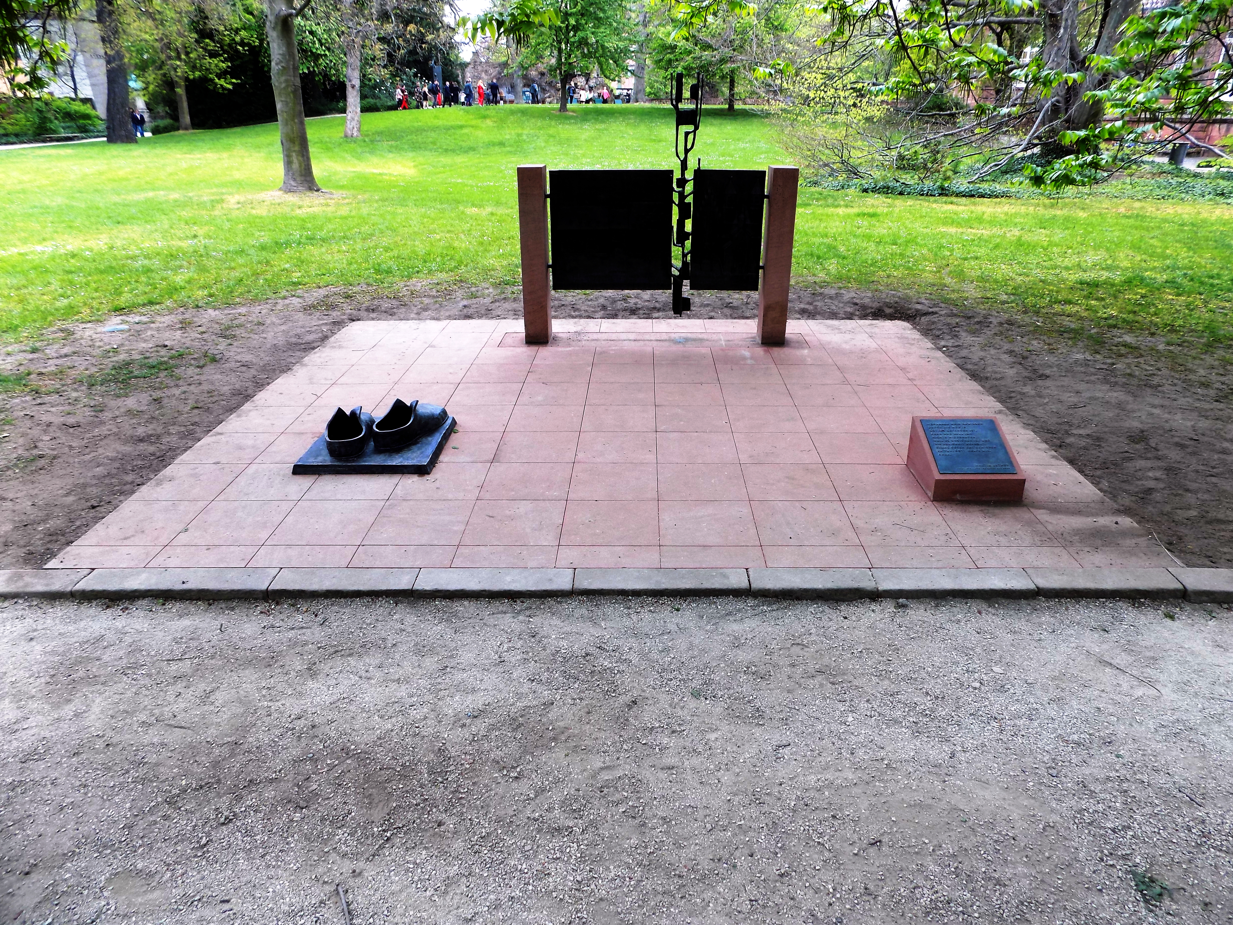 Die Großen Schuhe Luthers (Gedenkort Gesamt)